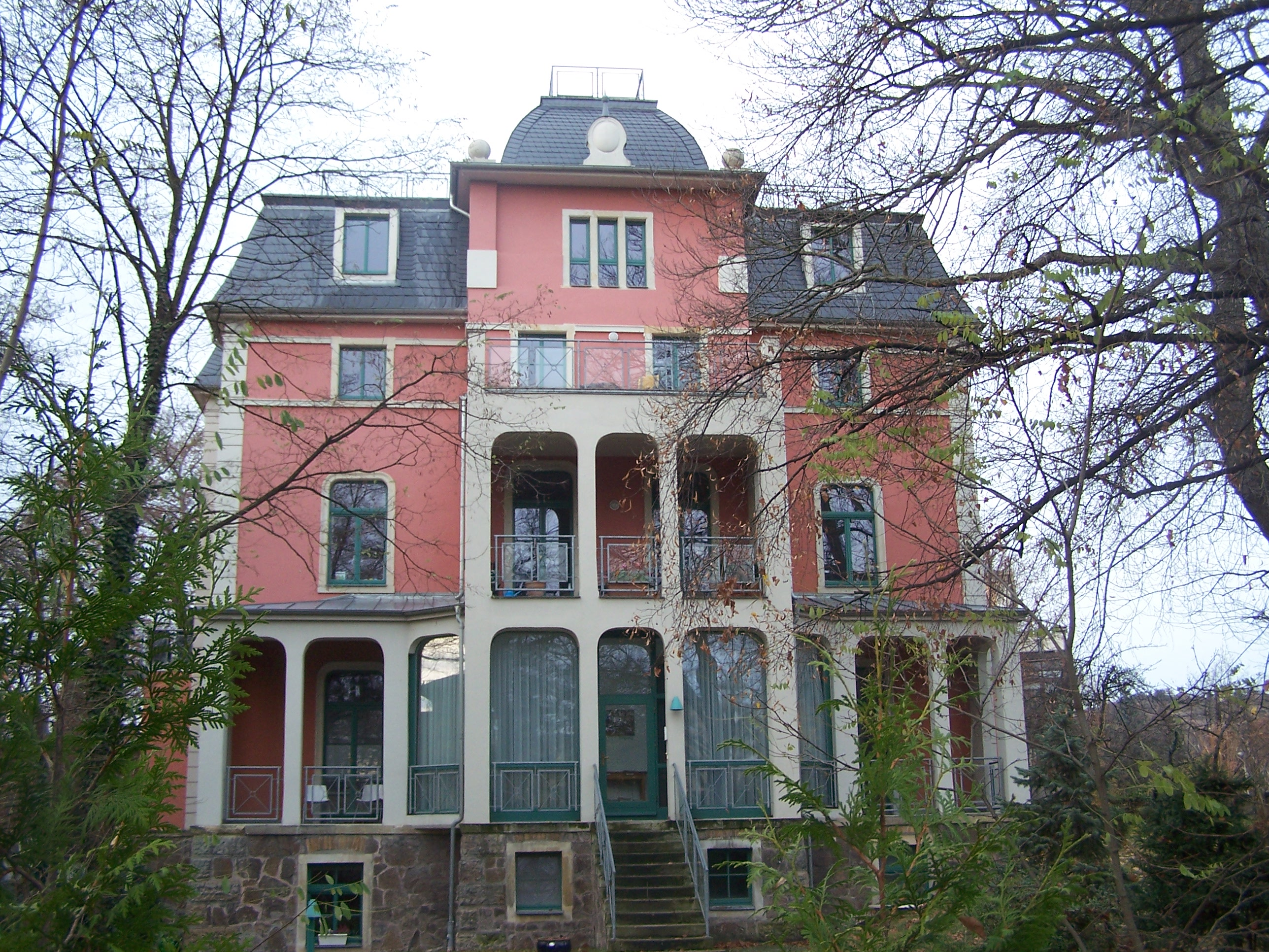 Villa Hölderlinstrasse 1, Radebeul, Saxony.